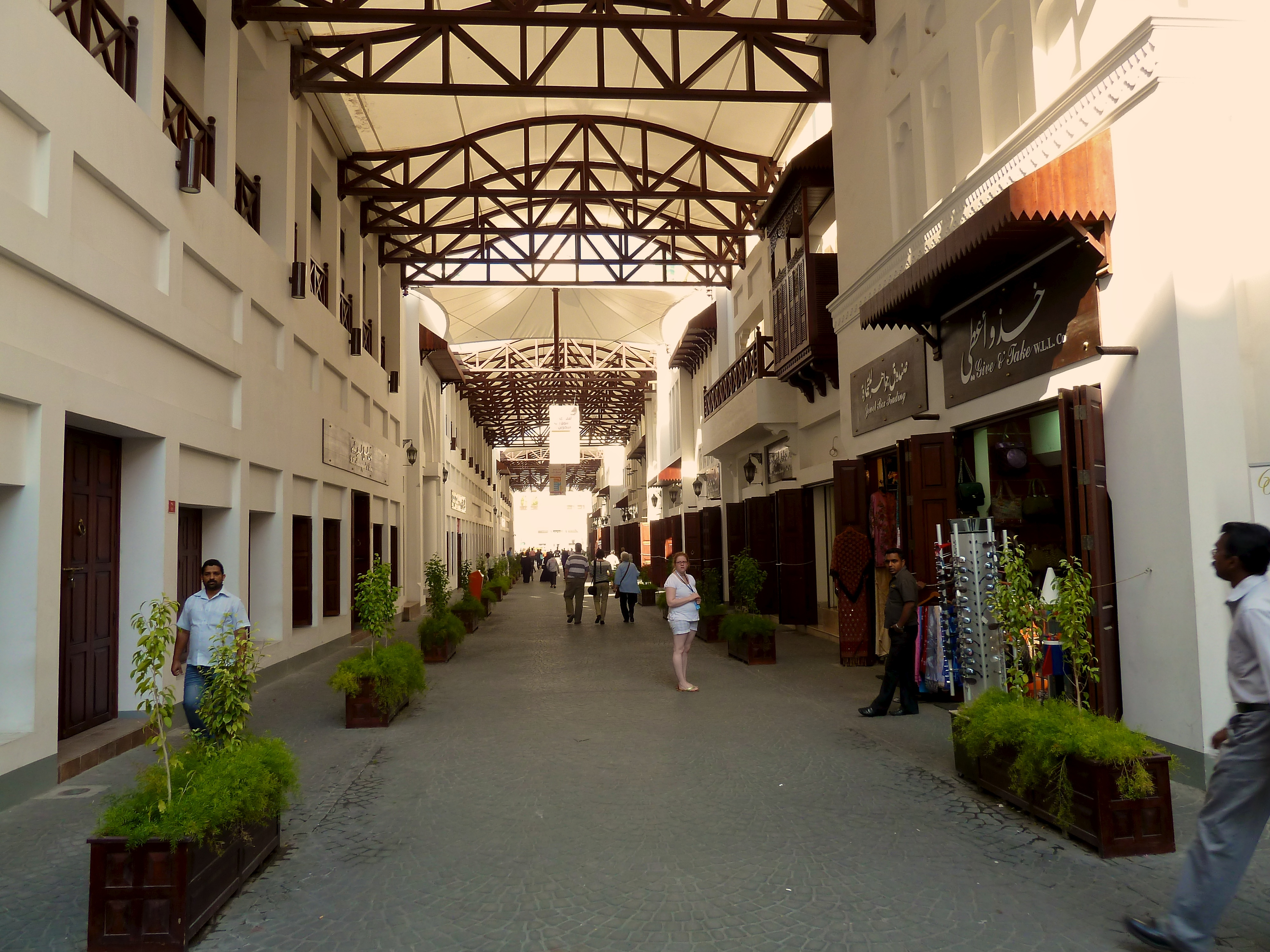 An alley behind Bab al Bahrain in Manama, Bahrain.